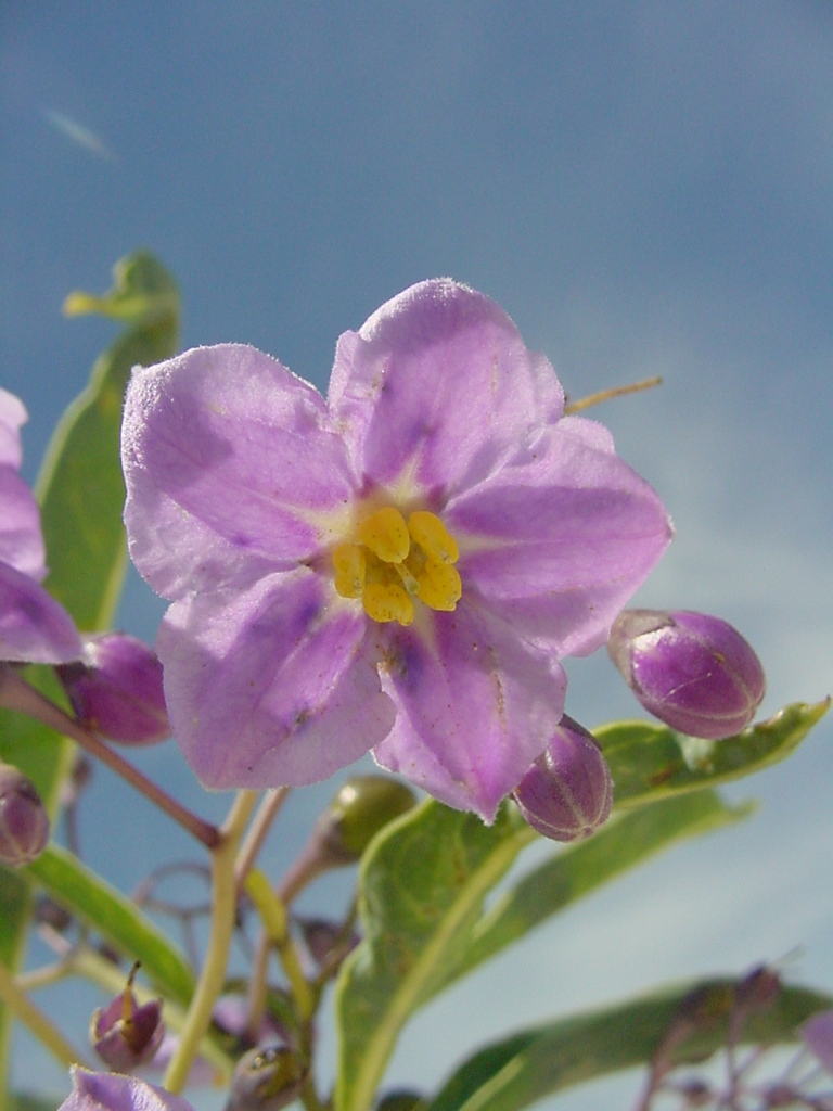 Solanum glaucophyllum - SOLANACEAE - Lagoa Mirim - Taim - RS - Brasil